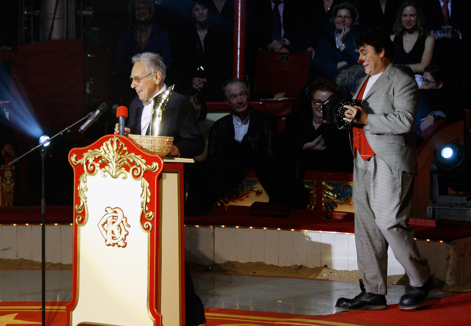 Der für sein Lebenswerk geehrte Schauspieler Otto Tausig und Clown David Larible während der Verleihung des Nestroy-Theaterpreises 2009 (Circus Roncalli auf dem Wiener Rathausplatz).